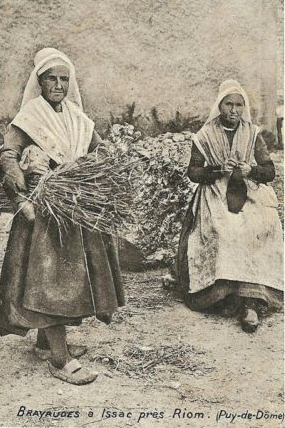 Carte postale ancienne montrant les vielles brayaudes